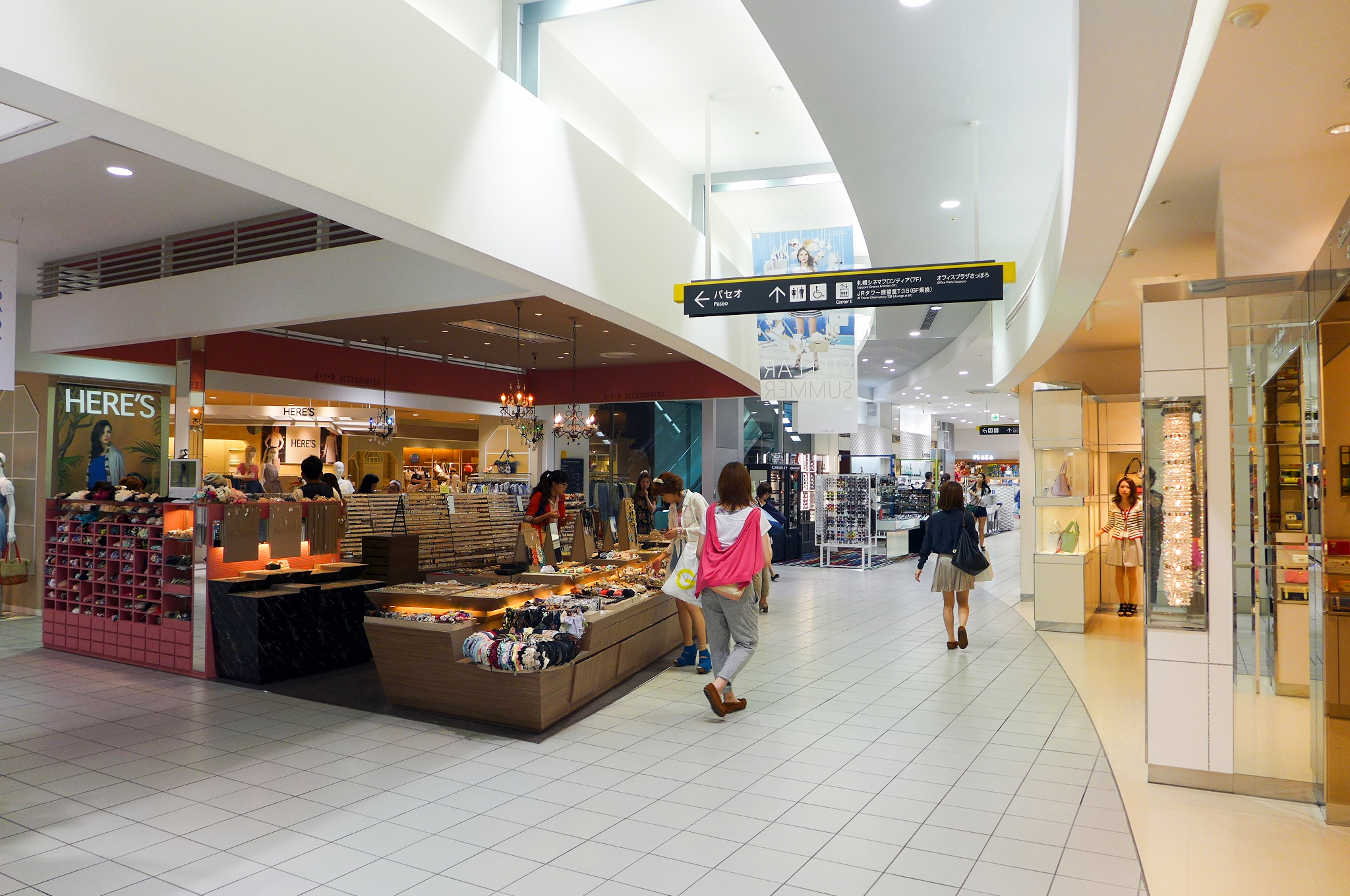 Stellar Place Sapporo B1